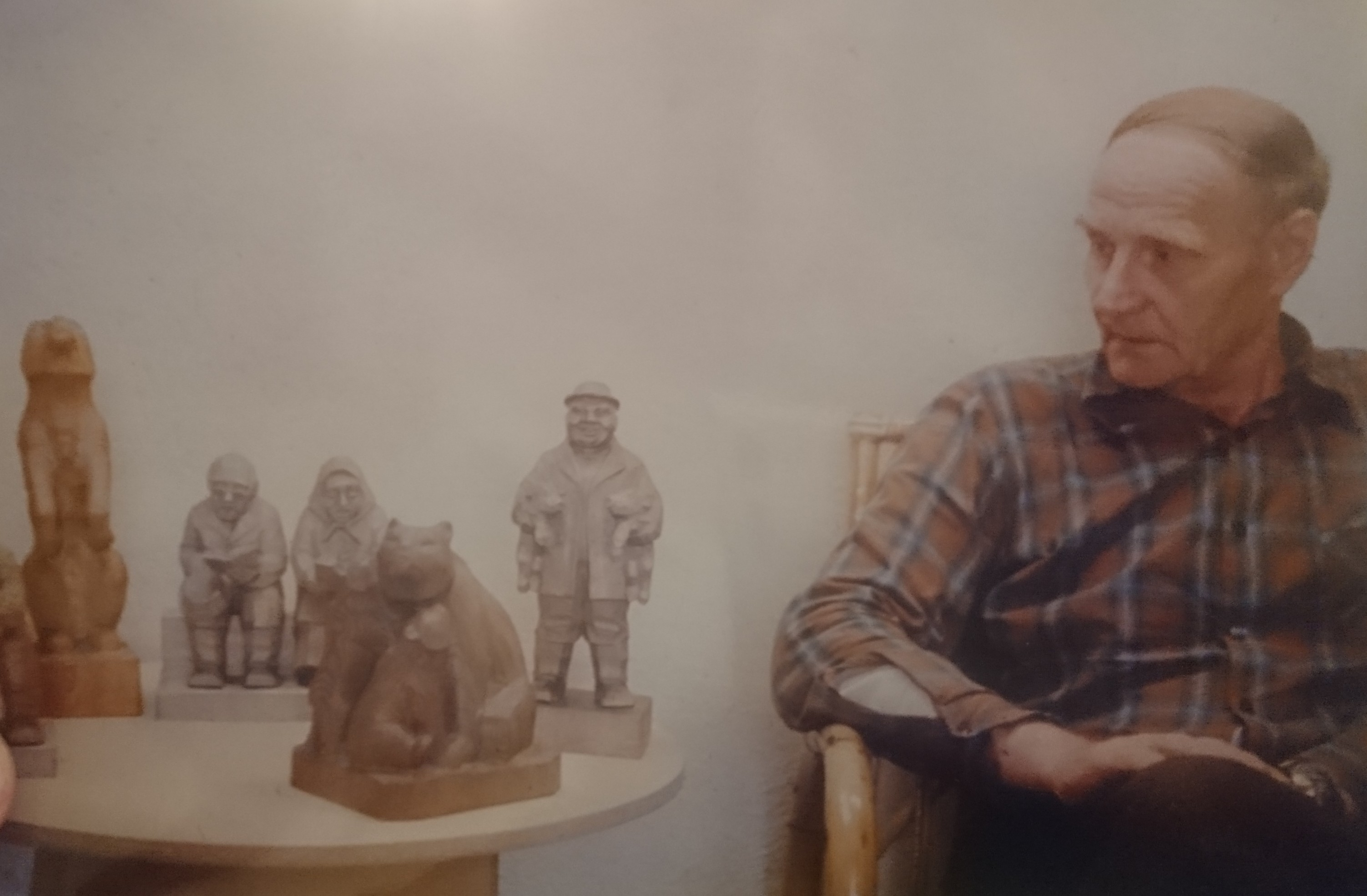 Uuno Nurmi